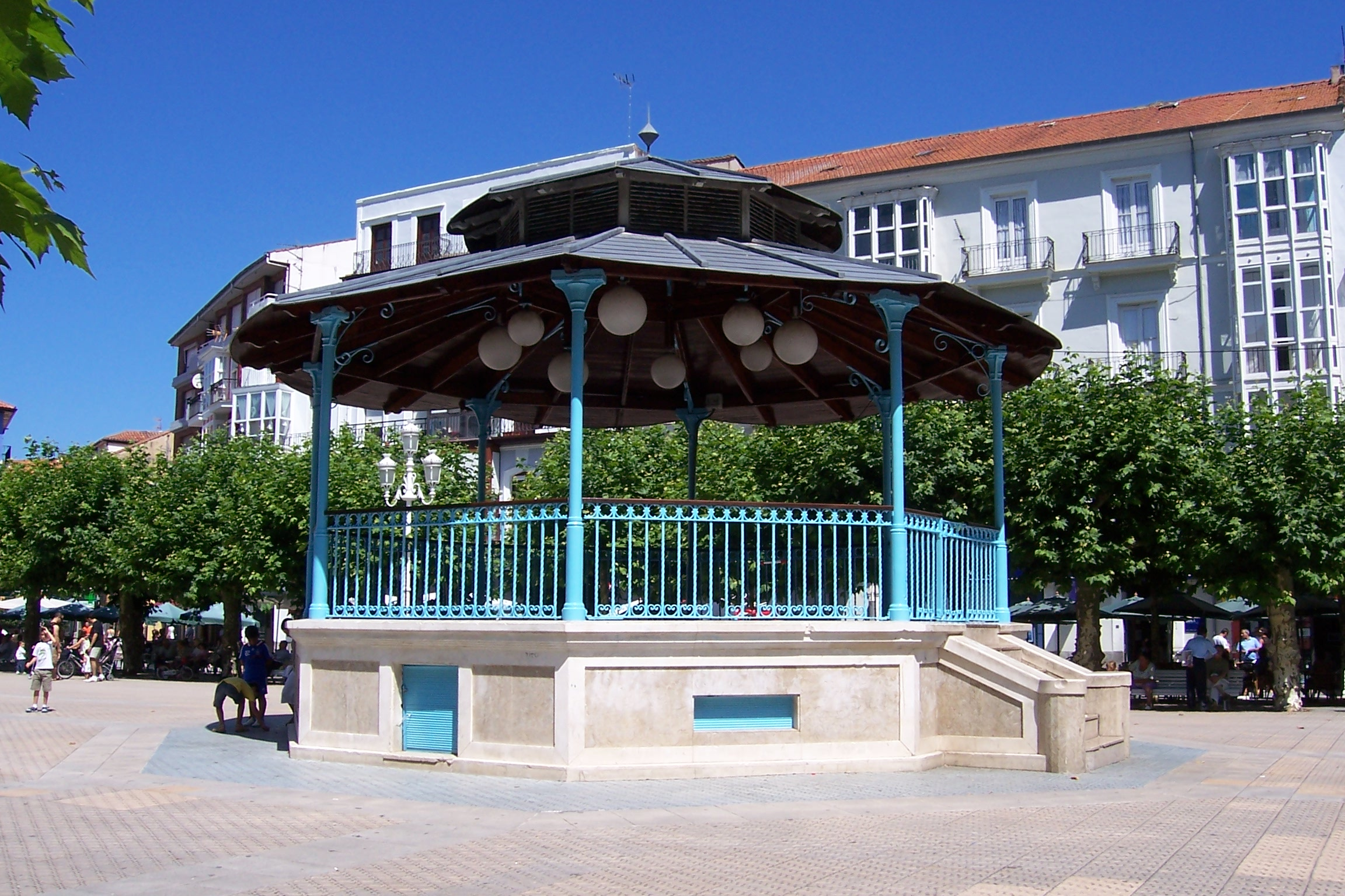 Kiosco de la música en la plaza de San Antonio de Santoña (Cantabria, España).